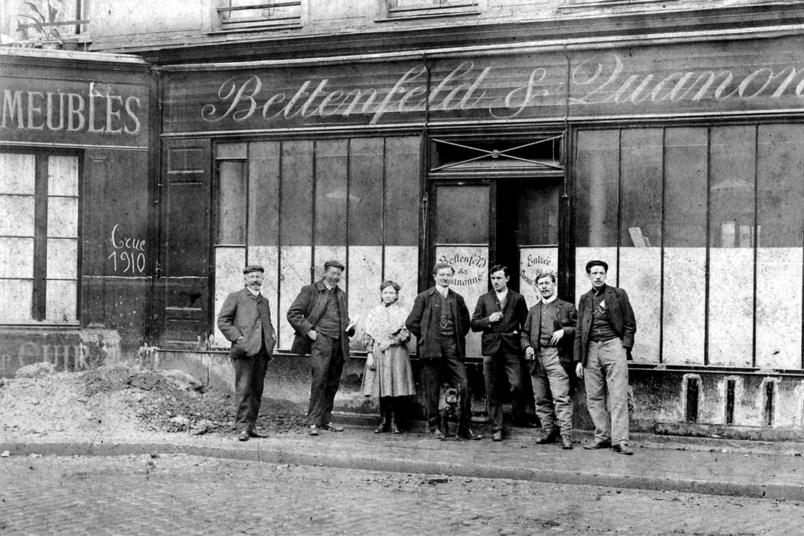 Atelier Bettenfeld & Quanone, Futteralmacher (Etuimacher), 86 rue Ledru Rollin, Paris, 11. Arrondissement, 86 rue Ledru Rollin, nach dem Hochwasser von 1910.